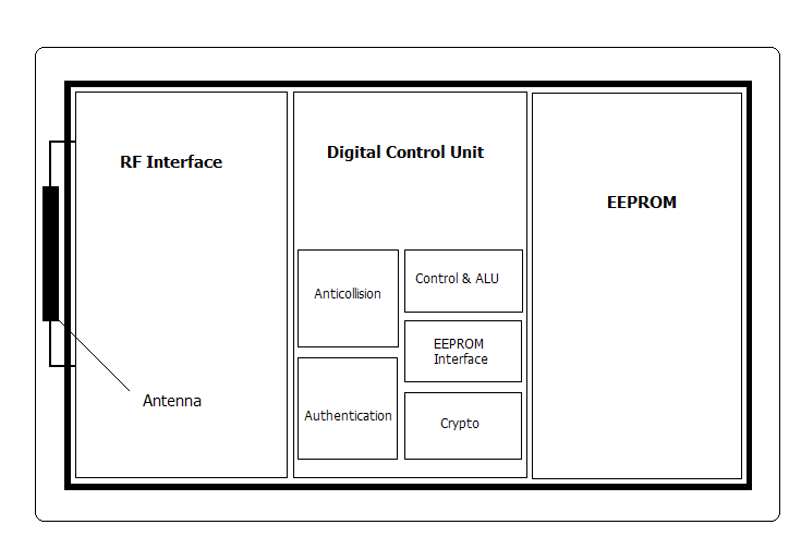 Diagram blokowy karty Mifare